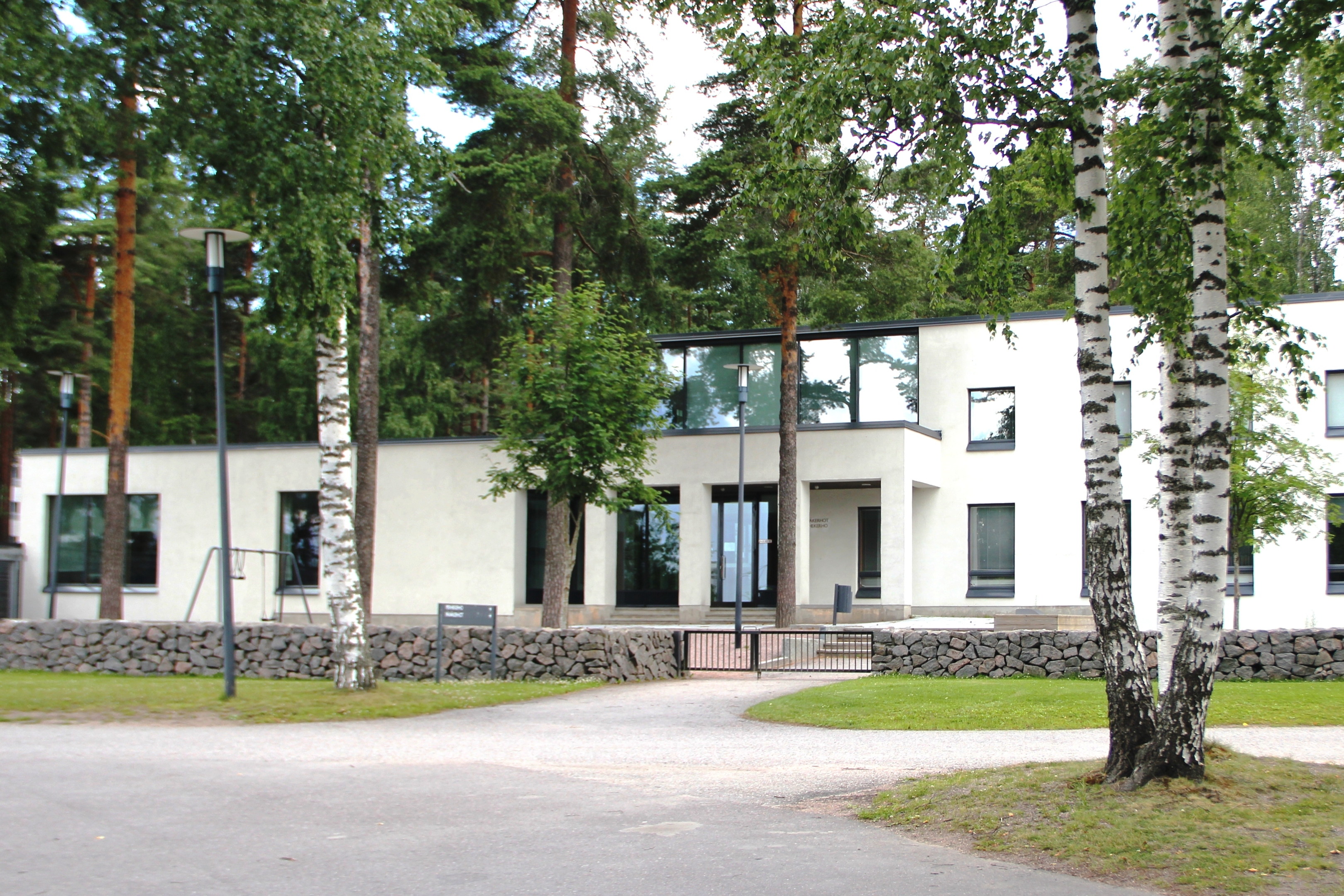 Nummelan seurakuntakeskus ja kirkko (=Vihdin seurakuntatalo), Kappelitie, Nummela, Vihti – Arkkitehtitoimisto Esko ja Tarja Toiviainen 1969 ja arkkitehtitoimisto Kirsti Sivén & Asko Takala Arkkitehdit 2005.